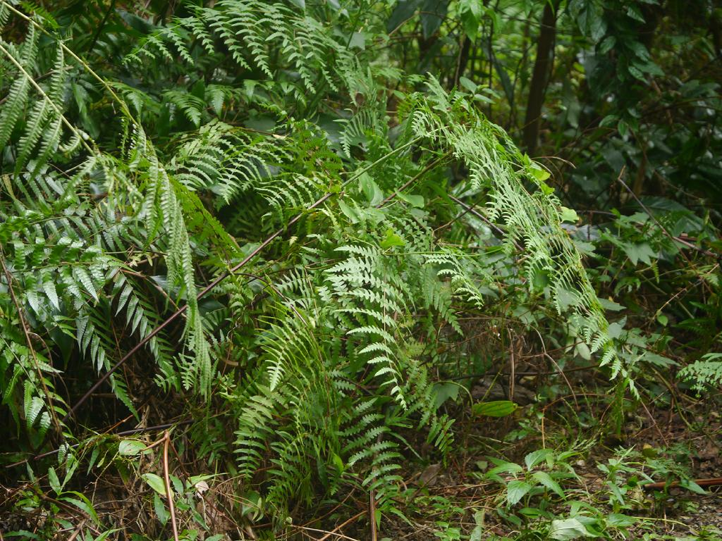 Histiopteris incisa：ユノミネシダ 2015/08/26 沖縄本島：Okinawa Island, Japan